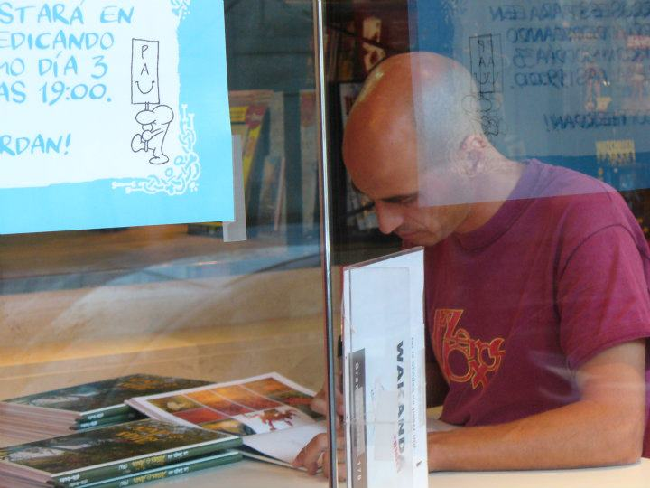 Durante una presentación de "La saga de Atlas Y Axis"